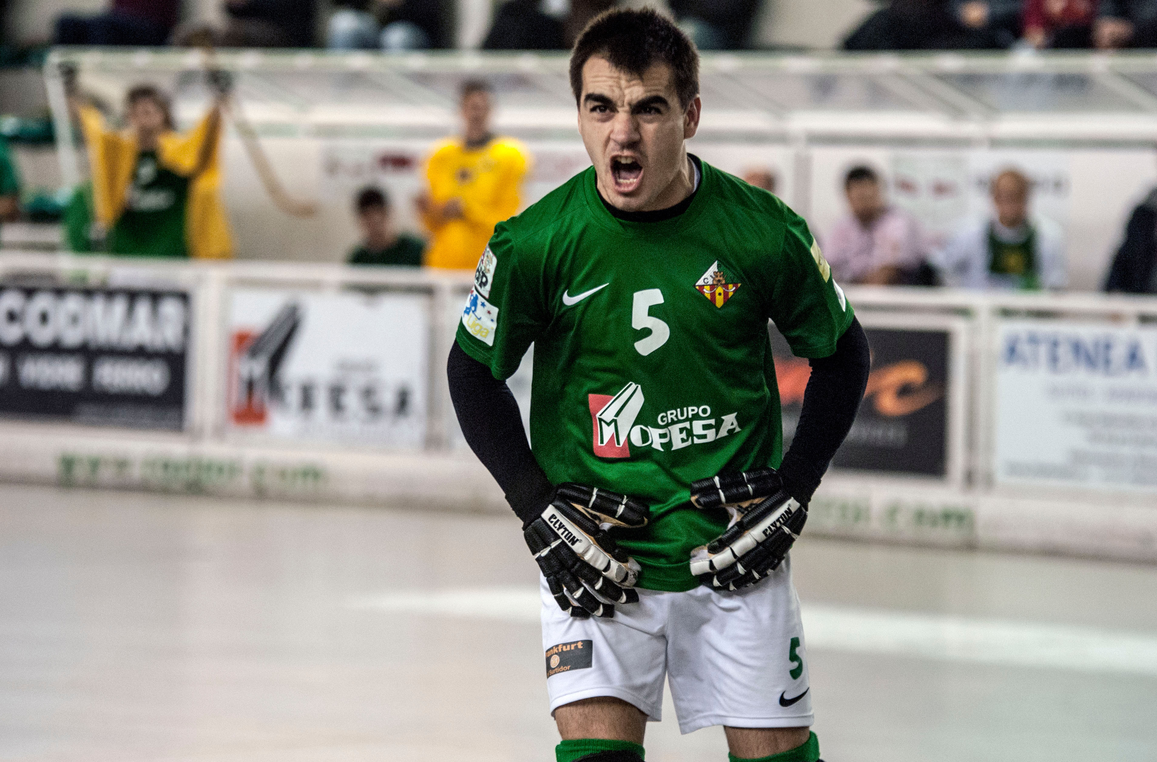 El jugador del Club Patí Vilanova, Francesc Gil, en un partit contra el Giovinazzo